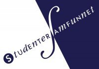 Studentersamfunnet i Bergens logo.